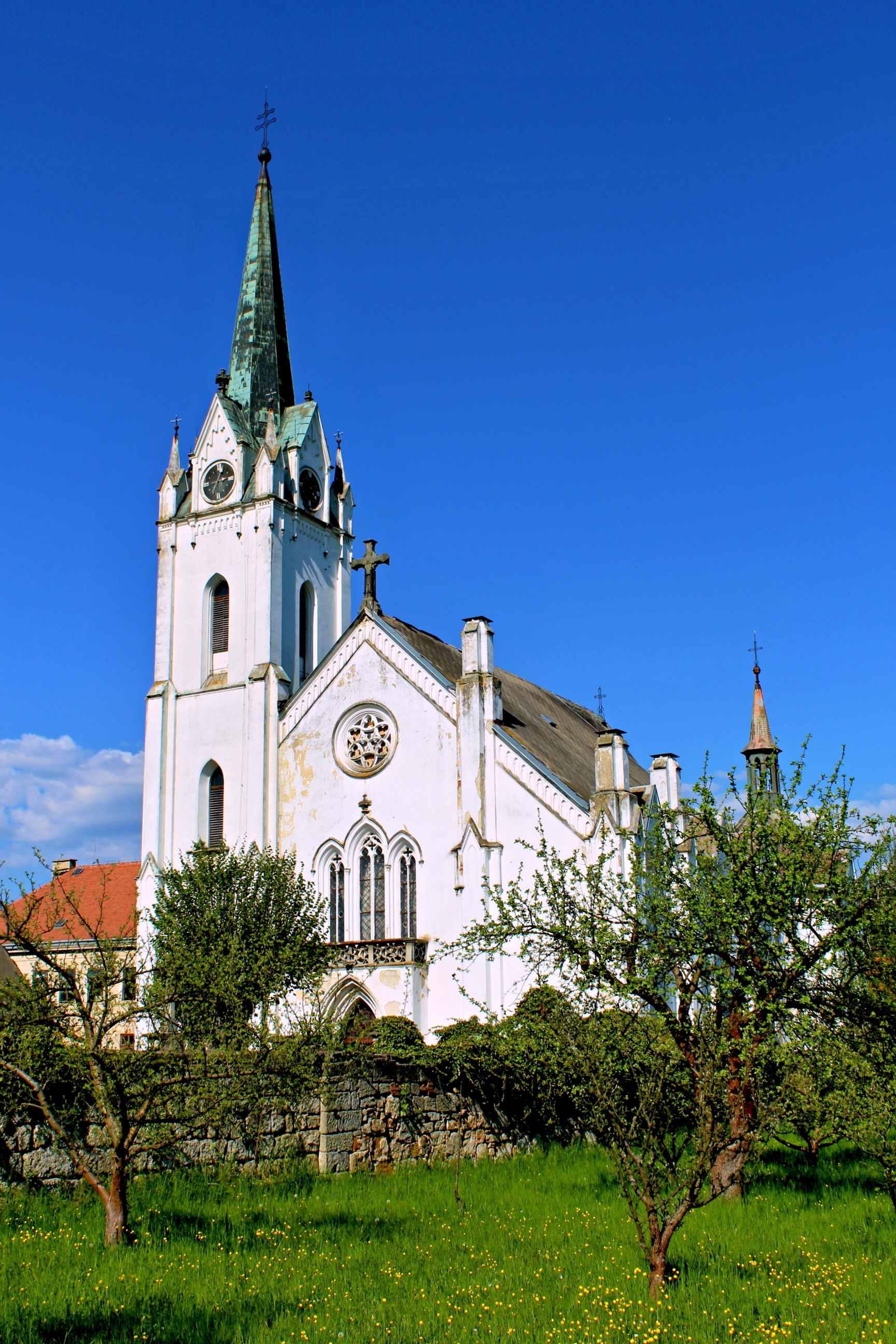 Zákupský kostel sv. Fabiána a Šebestiána